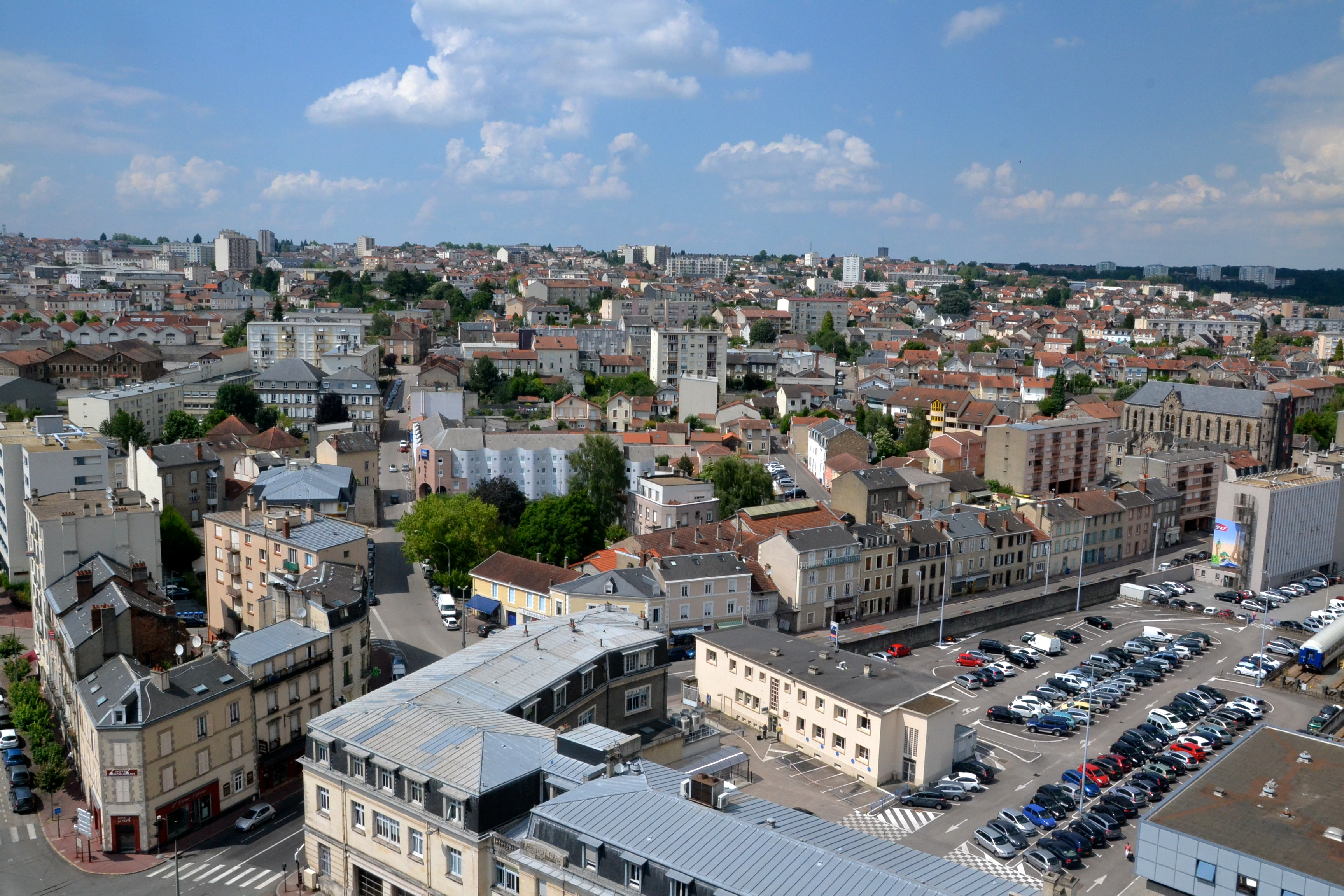 Vue sur le quartier de la gare (Aristide Briand, Chinchauvaud, Grand Treuil et Brégère) depuis le campanile.